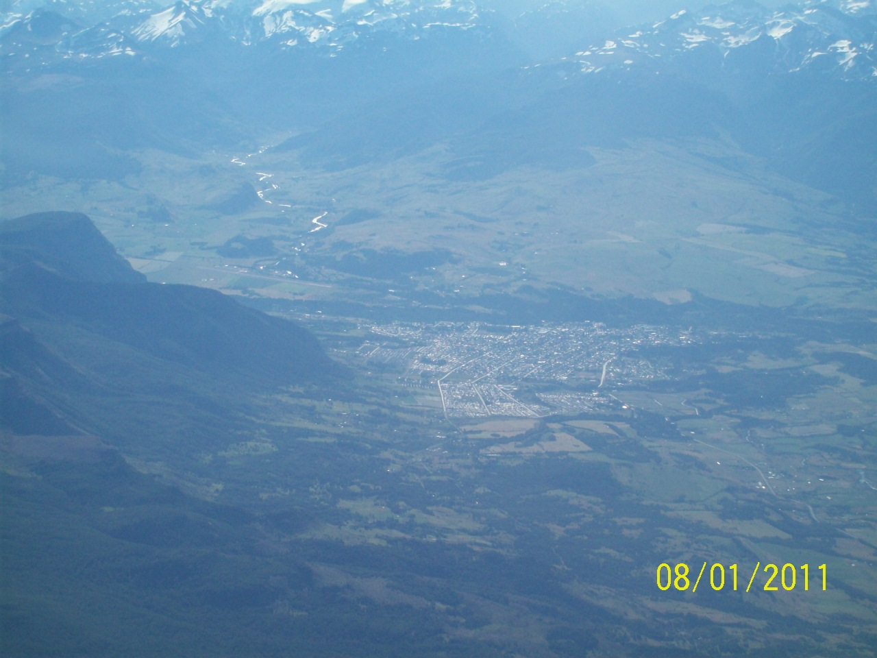 Vista aerea de coyaique en 2011